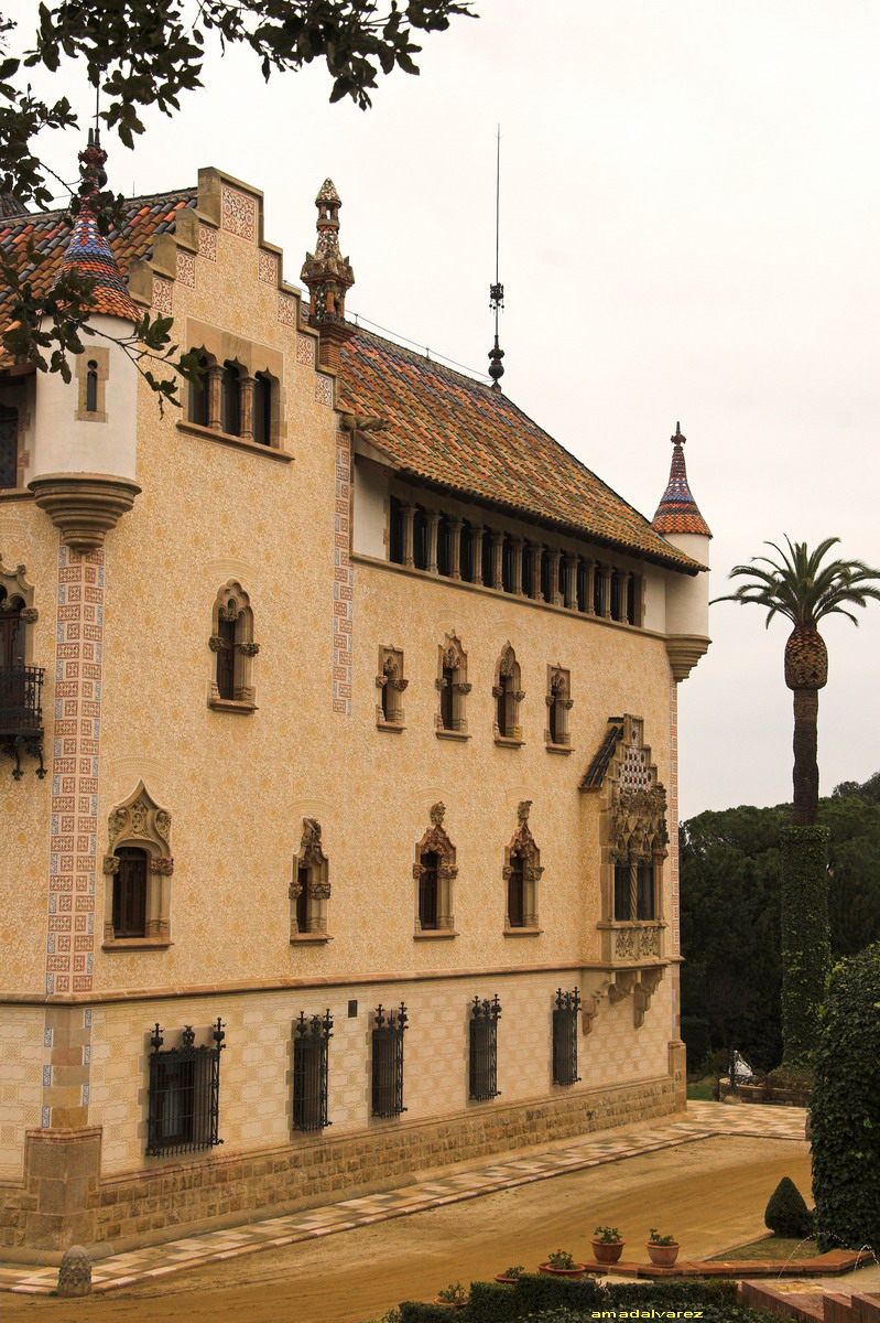 Casa Garí (Argentona-Maresme-Catalunya), obra de Josep Puig i Cadafalch 1898.